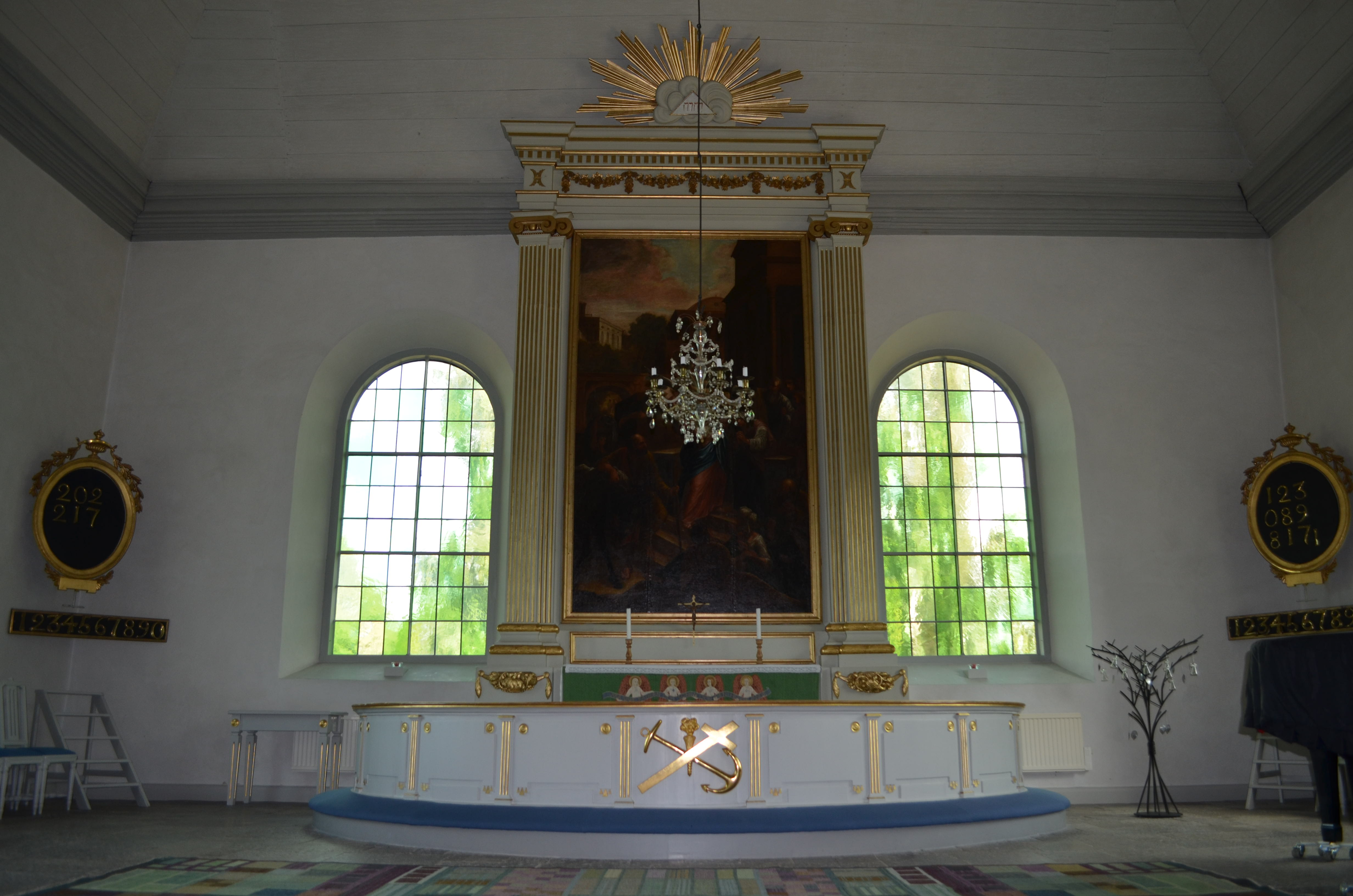 Altaret.